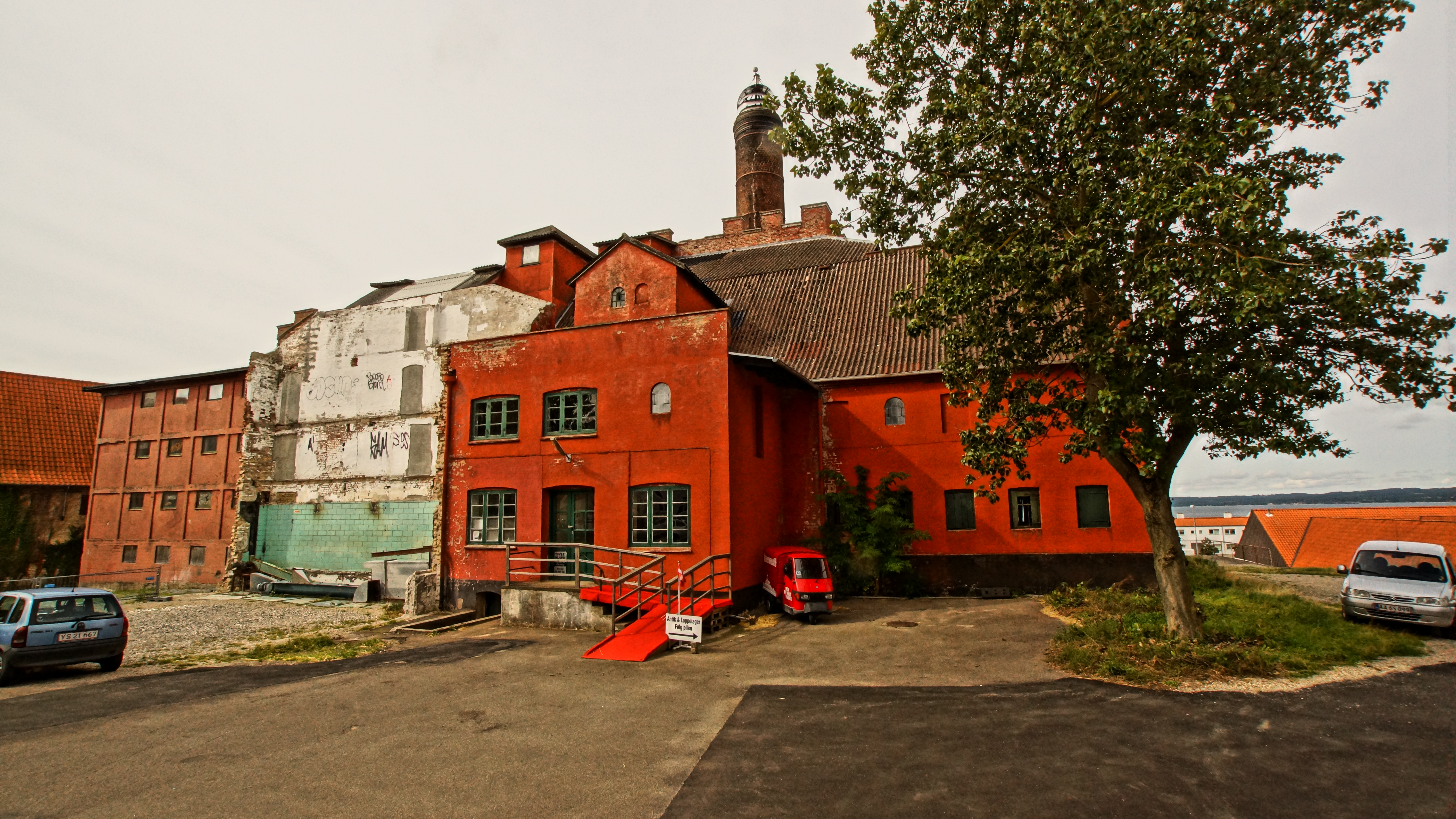 Maltfabrikken, Ebeltoft, 10.09.15